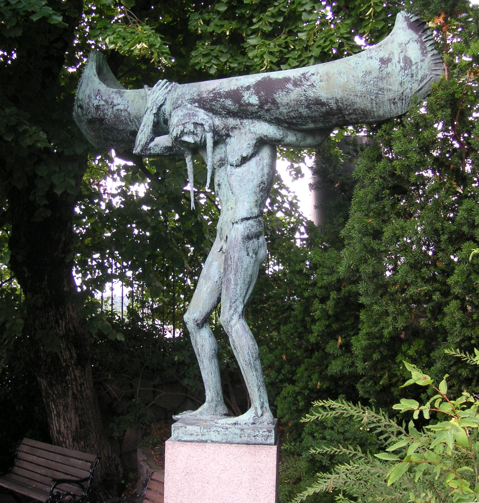 Carl Milles skulptur "Indian med kanut" eller "Spirit of transportation"